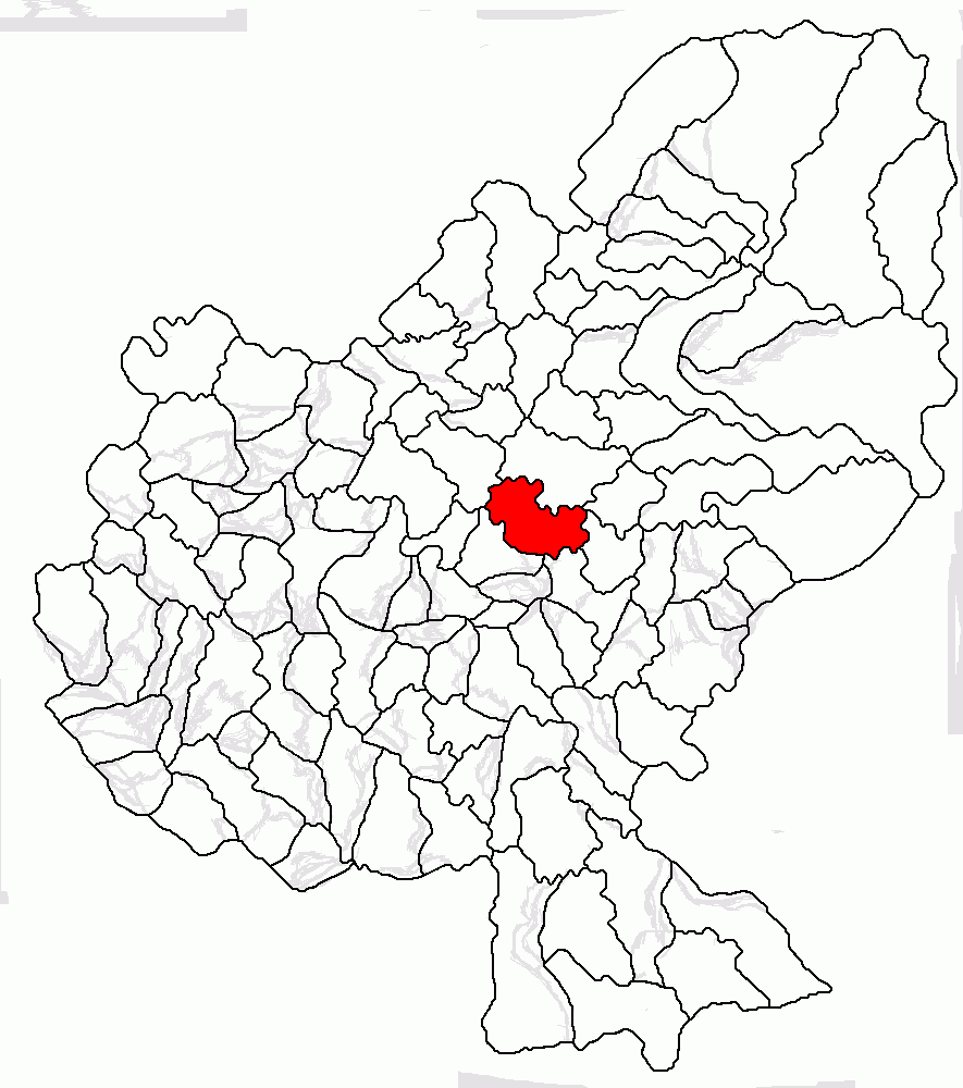 Categorie:Hărţi ale judeţului Mureş